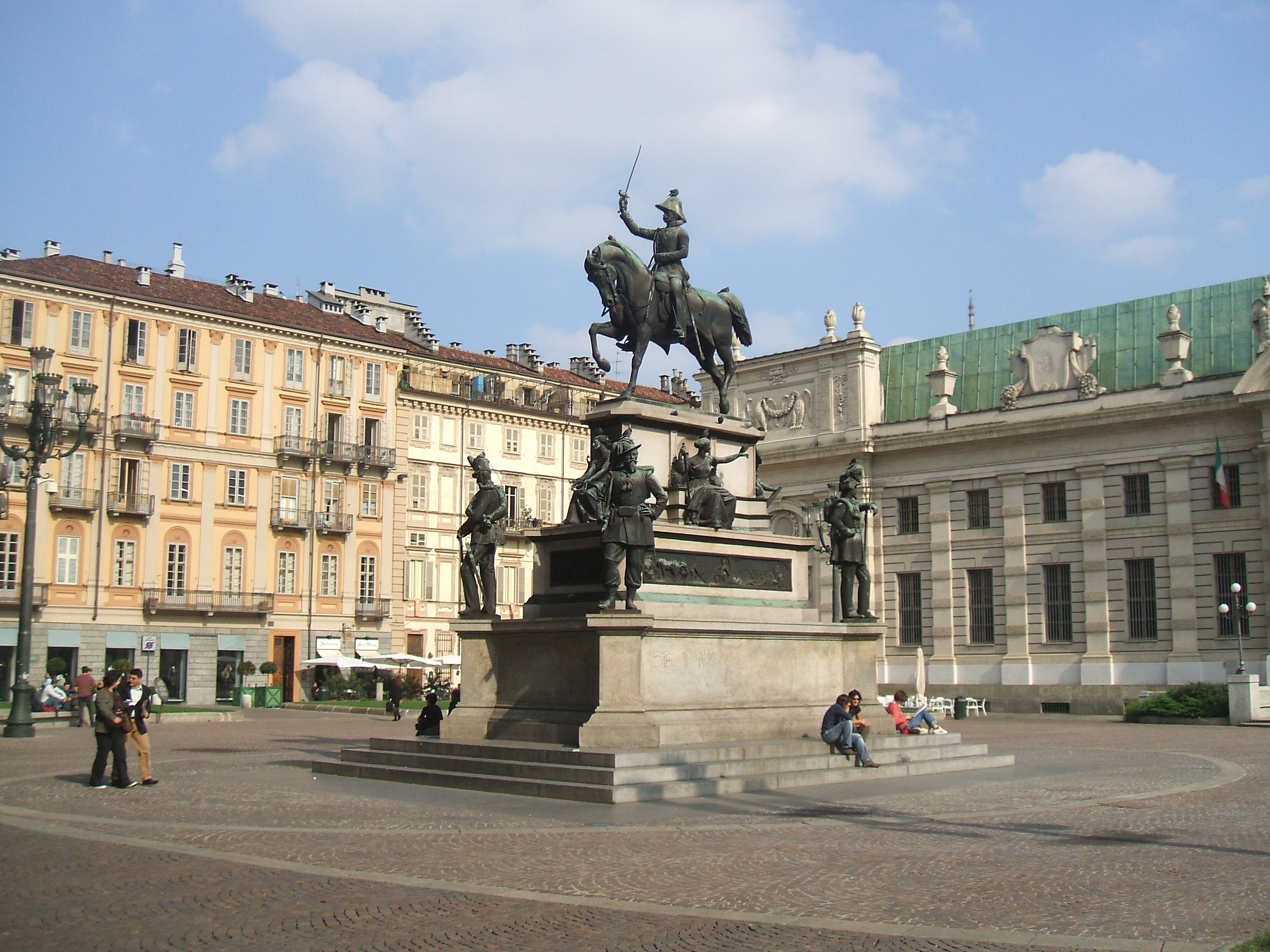 Piazza Carlo Alberto, a Torino, con il monumento equestre a Carlo Alberto di Savoia modellato da Carlo Marochetti